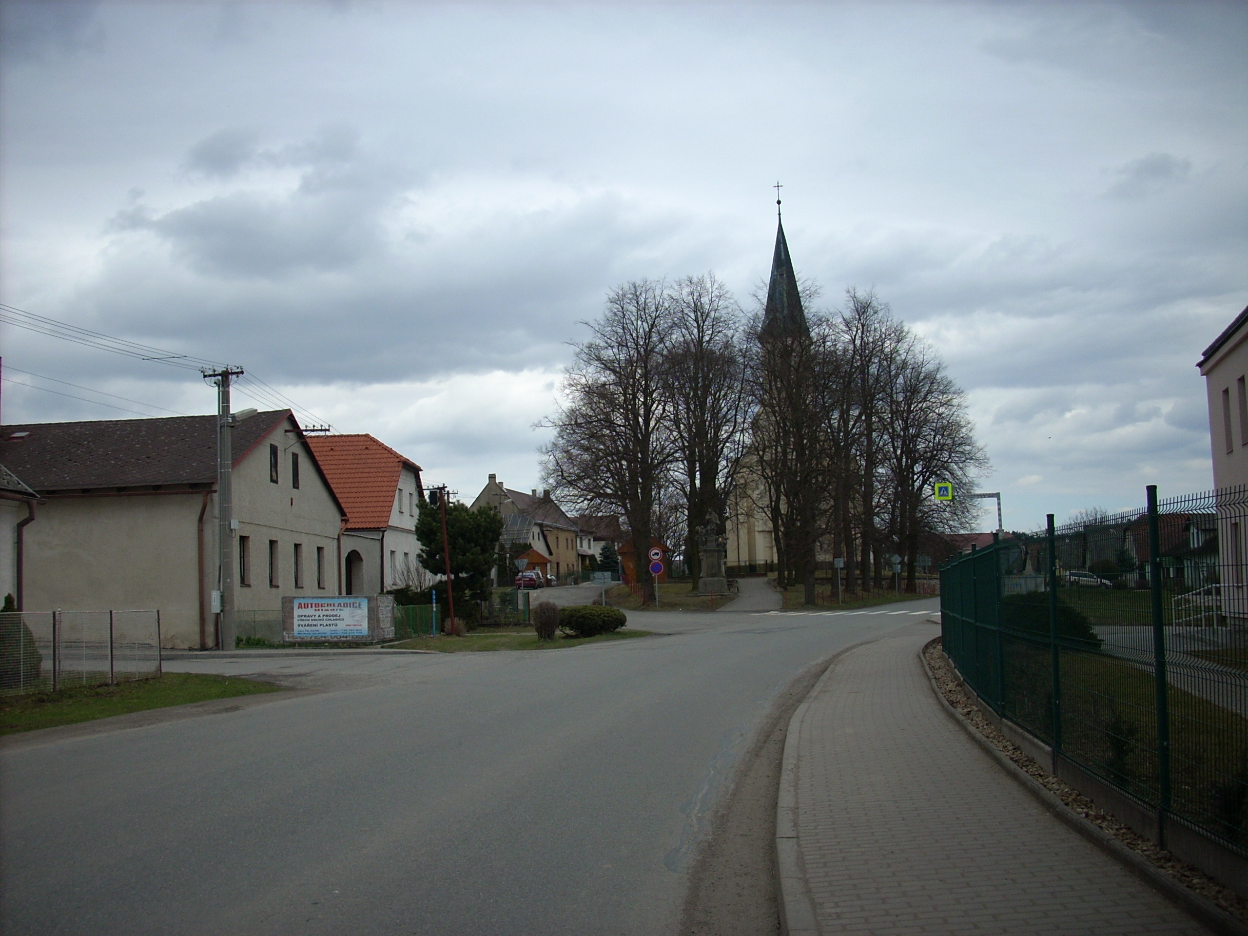 Ždírec (okres Jihlava), kostel sv. Václava